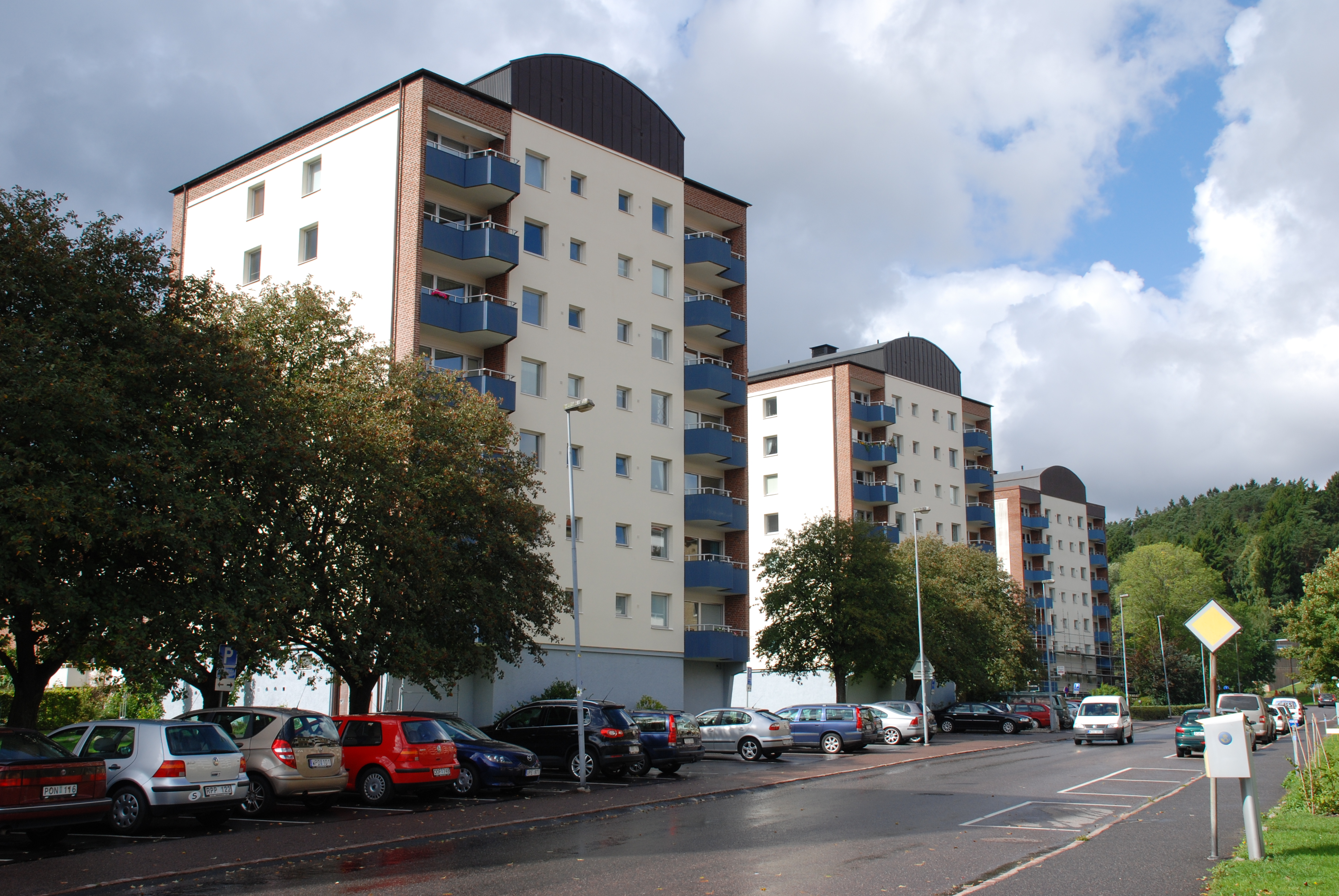 Häradsgatan 29-33 i stadsdelen Bosgården i Mölndal.